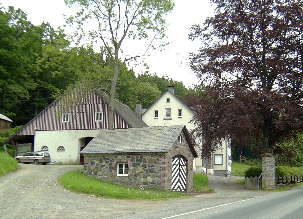 Jagdschloss Siedlinghausen, Winterberg-Siedlinghausen (Germany)